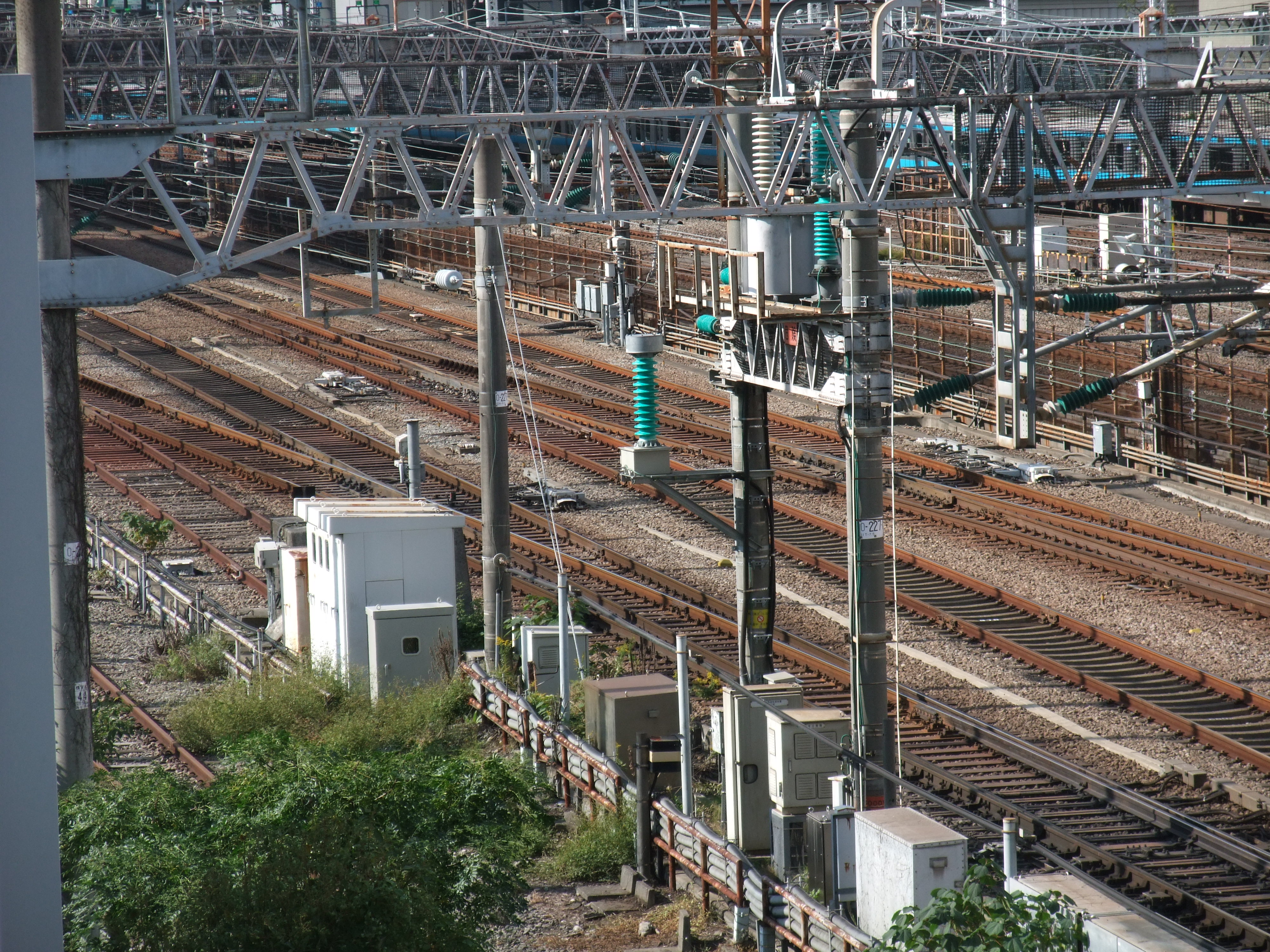 田町駅脇の東海道新幹線と大井車両基地への引き込み線の分岐点。電気転轍機と制御ボックスがズラリと並ぶ。